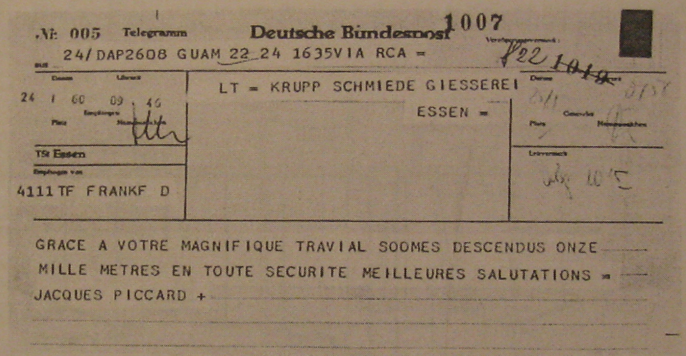 Telegramm von Jacques Piccard an Krupp Essen, 24. Januar 1960